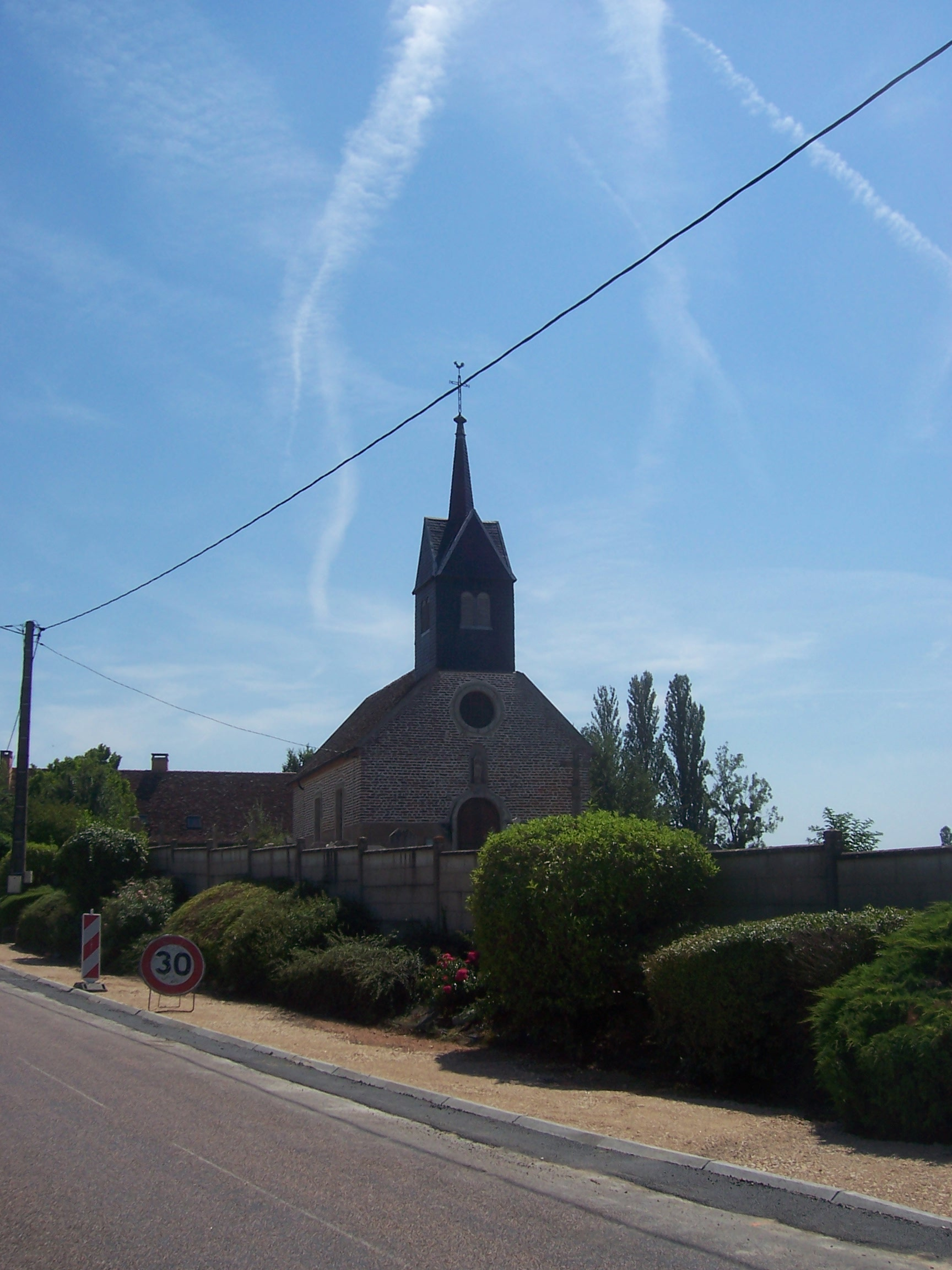 Eglise de Guerfand